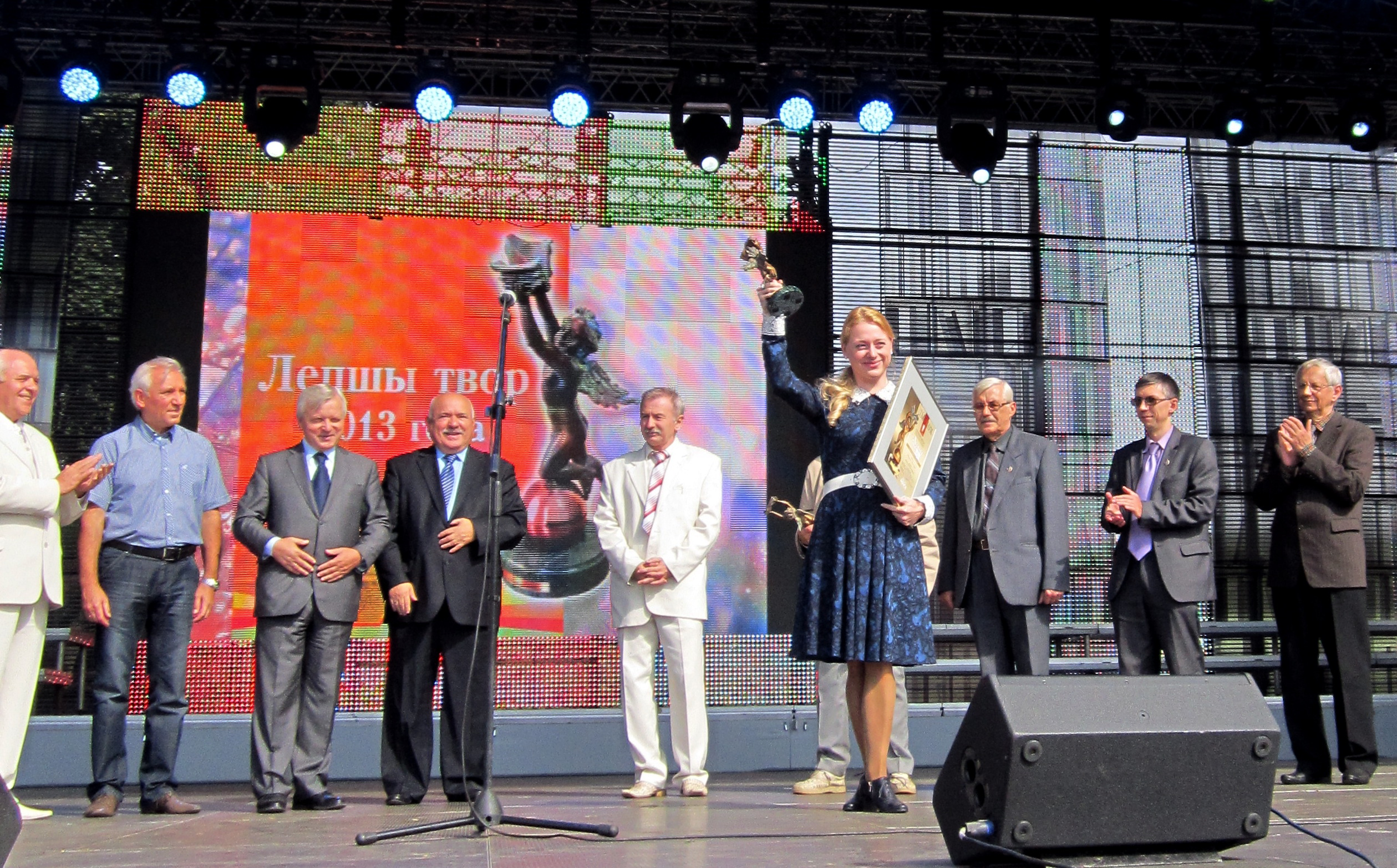 Узнагароджанне Таццяны Сівец літаратурнай прэміяй «Залаты купідон-2013». Заслаўе, Дзень беларускага пісьменства, 7 верасня 2014.